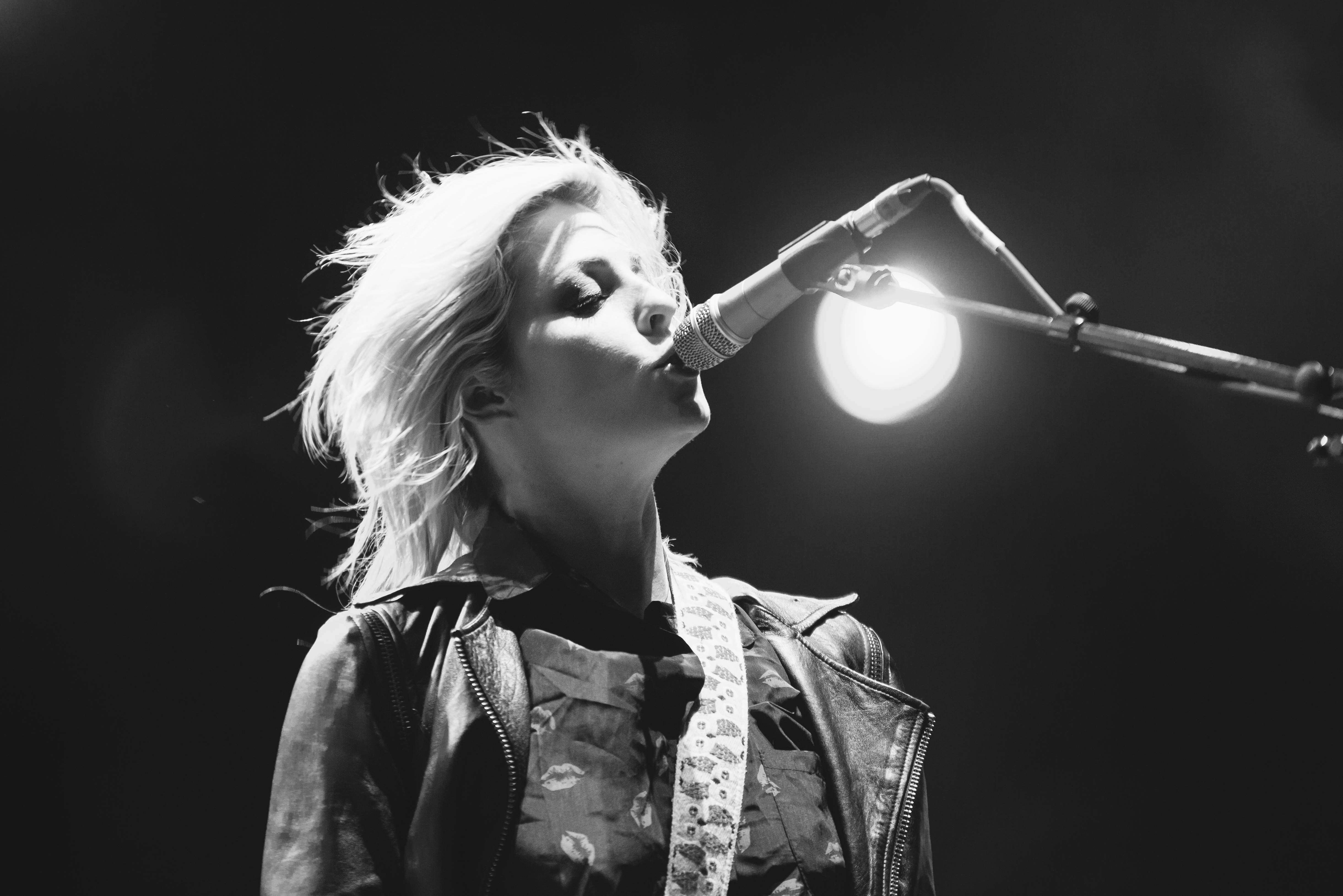 Brody Dalle auf dem Highfield Festival 2014